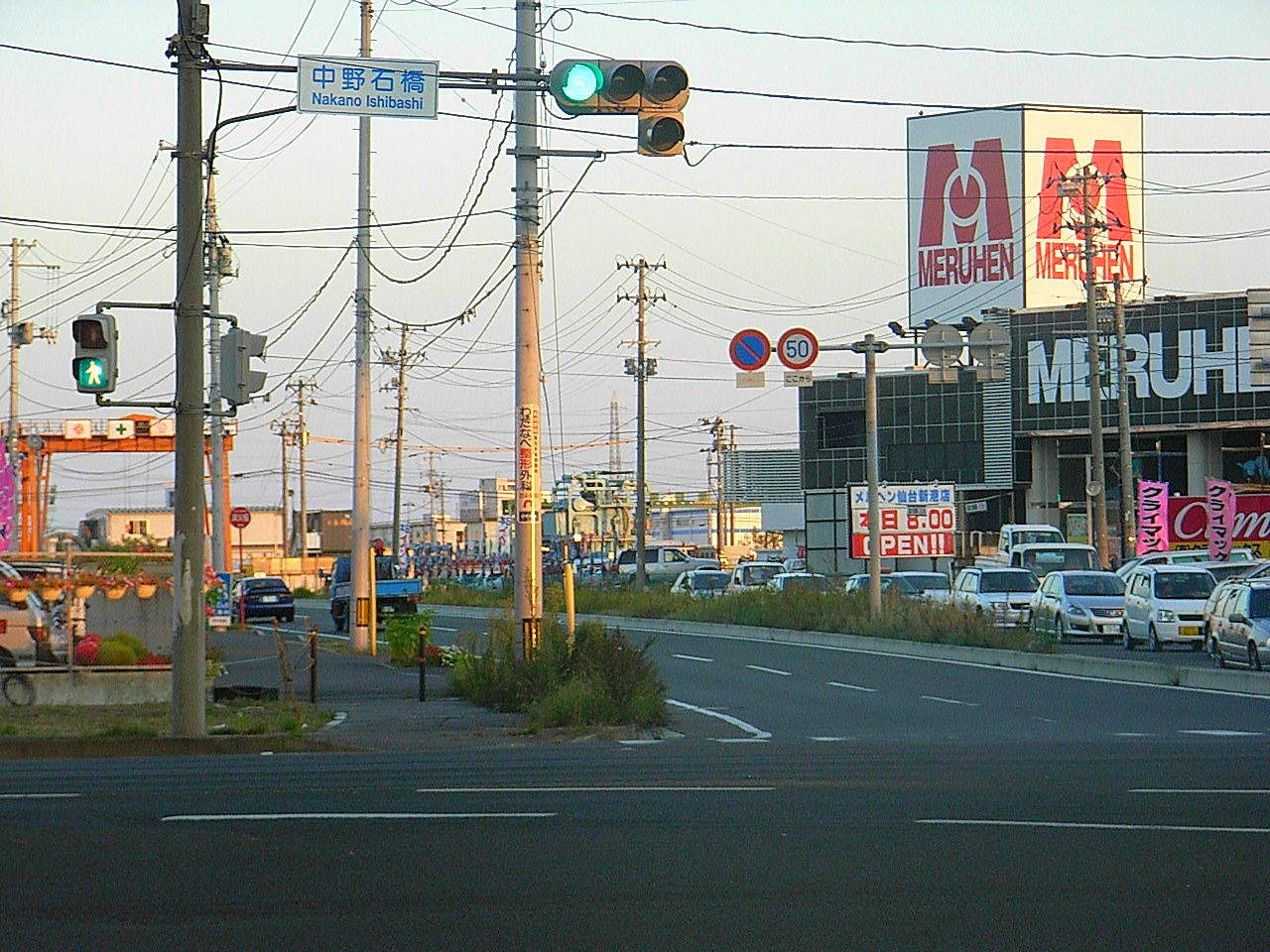 Miyagi Prefectural Road 10, Shiogama-Watari Line. Sendai, Miyagi prefecture, Japan.